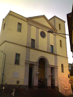 Chiesa di San Giorgio Martire (Napoli)